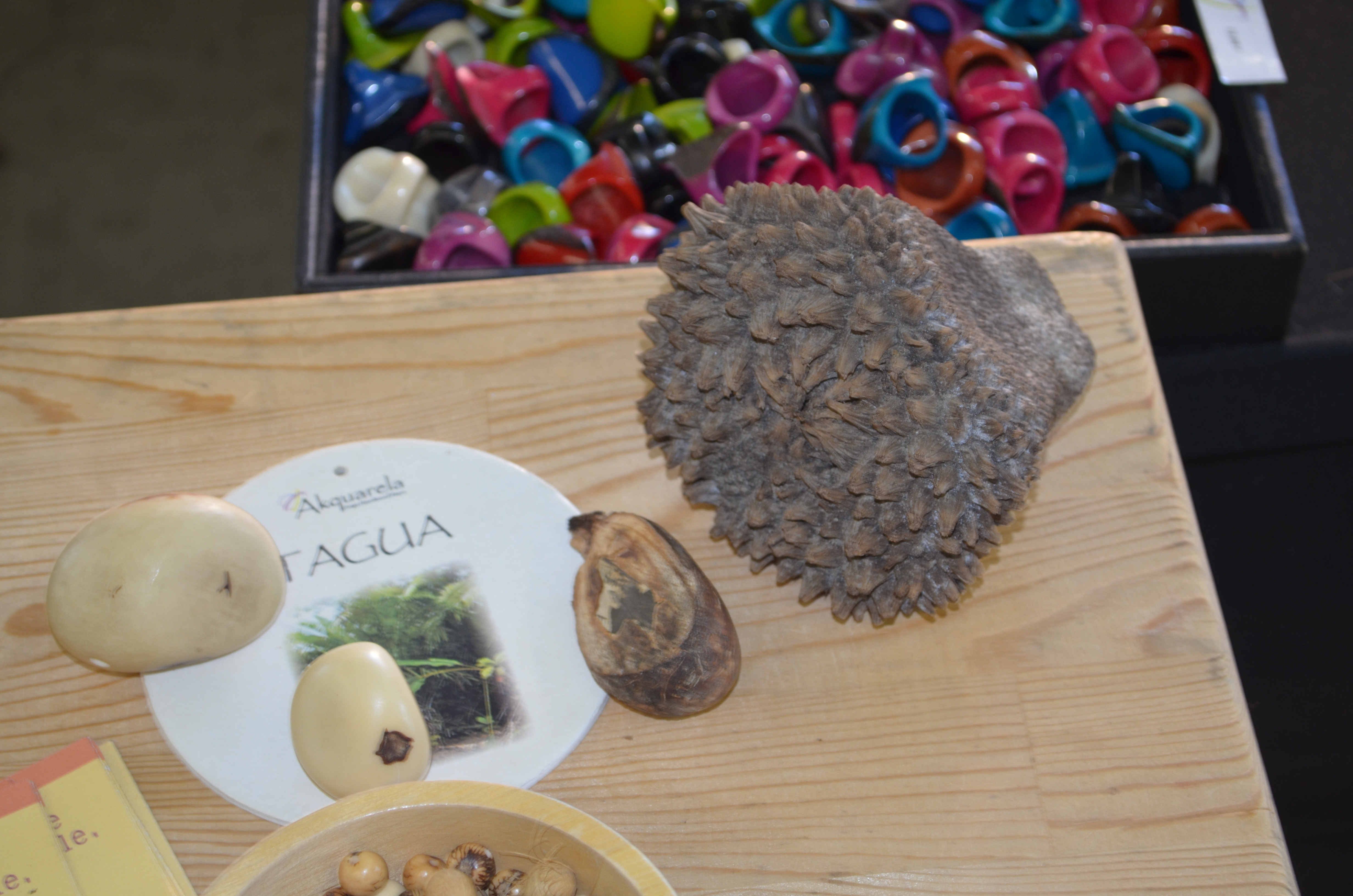 L'ivoire végétale, appelé aussi tagua ou corozo. Fruits présenté lors du salon Bio Foodle 2015 à Charleroi (Belgique).